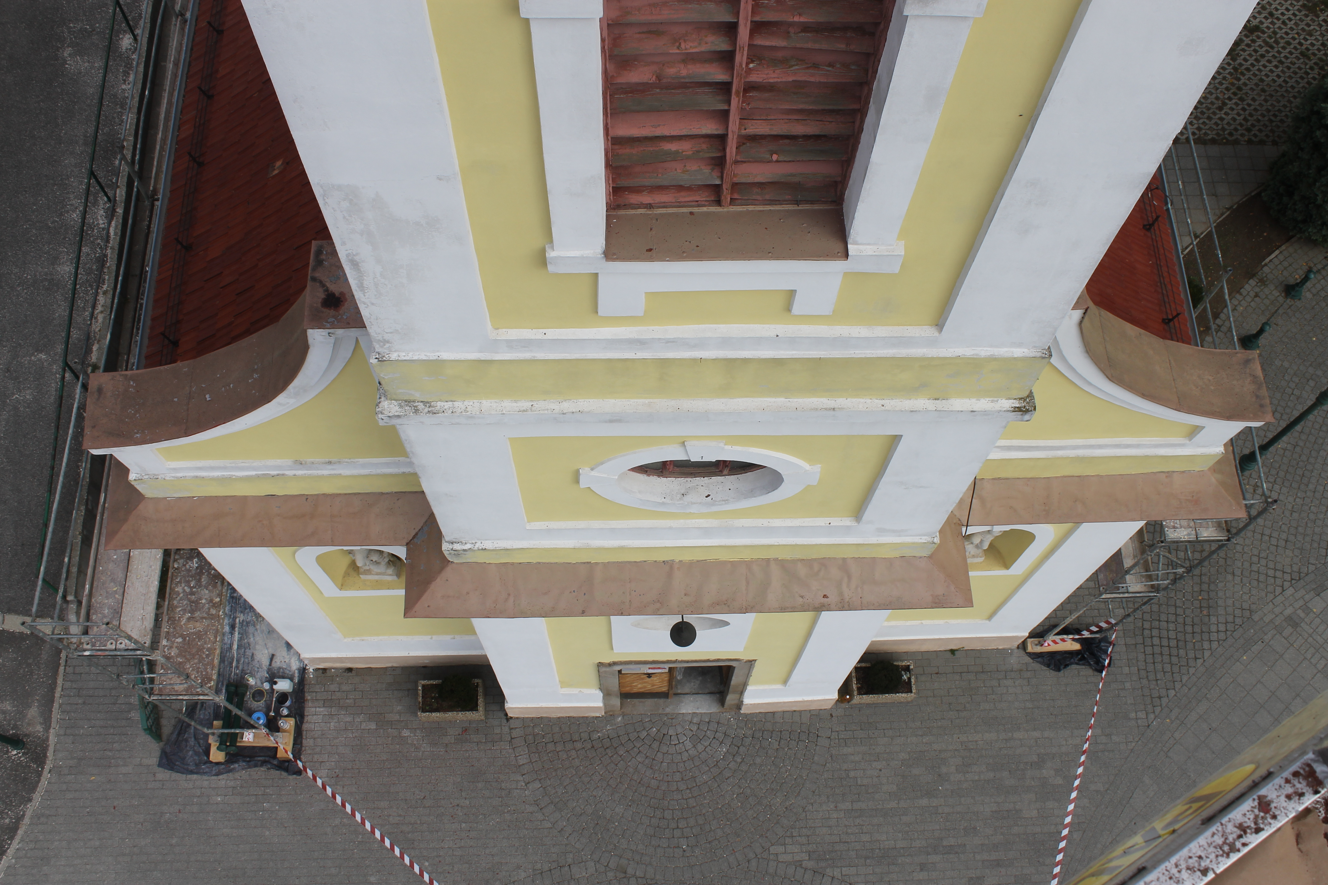 A pilisszentiváni templom érdekes felülnézetből